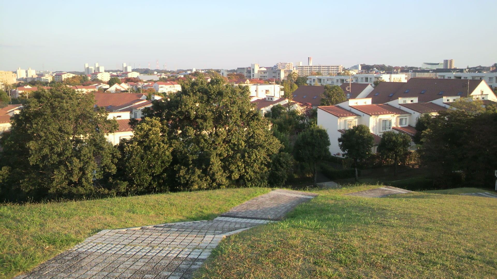 多摩ニュータウン鶴牧・落合地区のタウンハウスの家並み（13/11/06撮影）